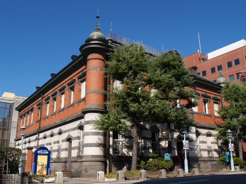 旧秋田銀行本店。秋田市立赤れんが郷土館・赤れんが館。